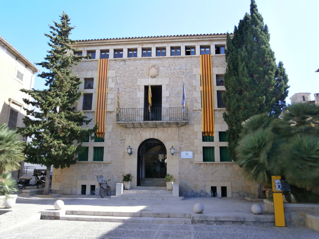 Rathaus Arta